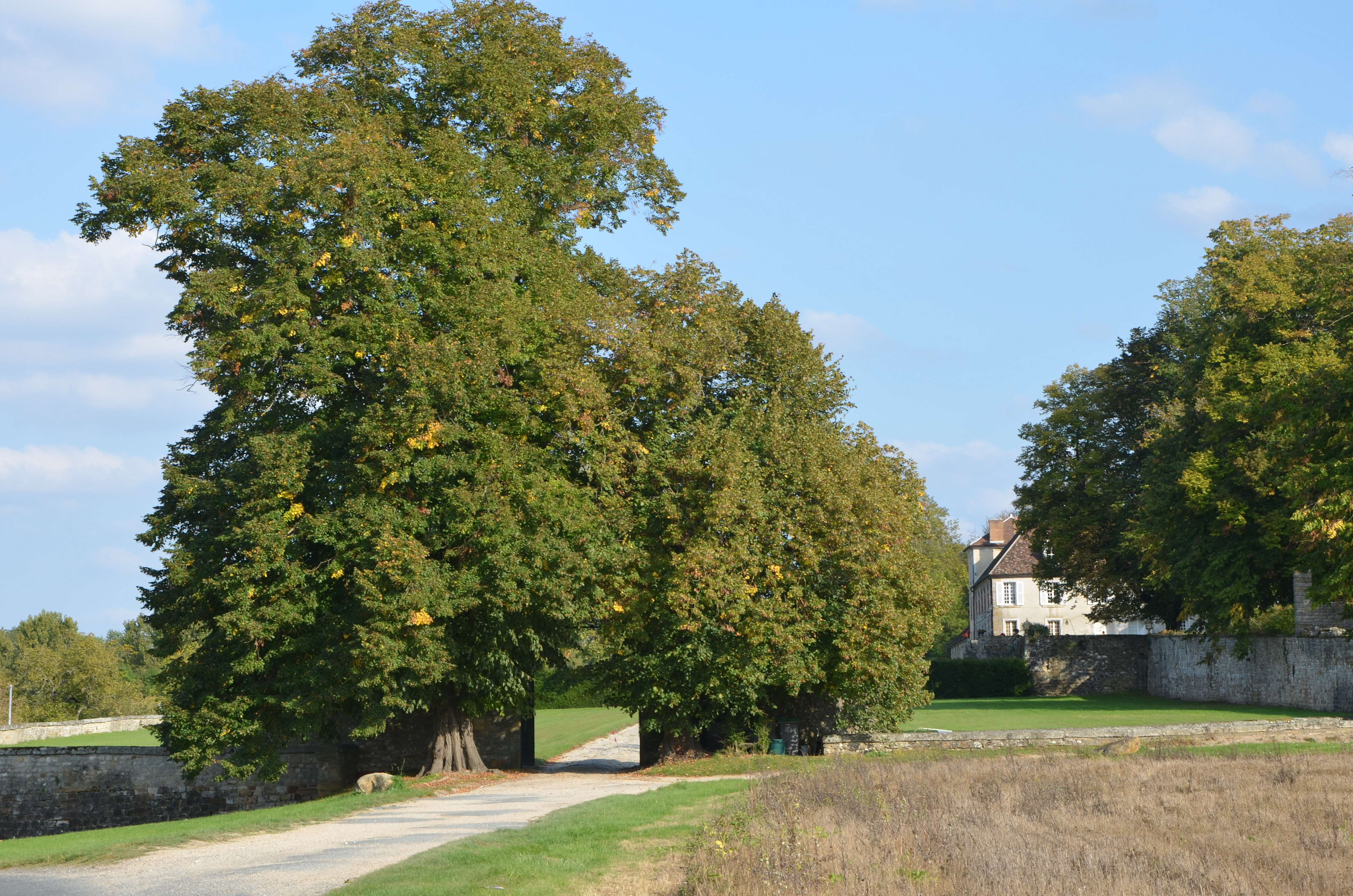 Entrée de l'ancien chateau de Saint-Ange à Villecerf (Seine et Marne, France)